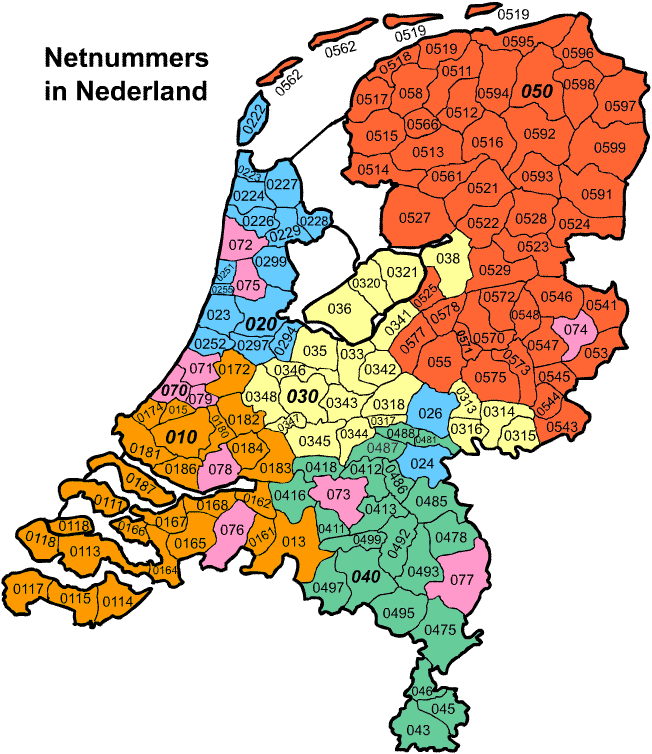 Zelfgemaakte afbeelding met daarop de indeling van netnummers in Nederland Image:Area codes of the Netherlands.gif Ofbyld:Netnumers yn Nederlan.gif